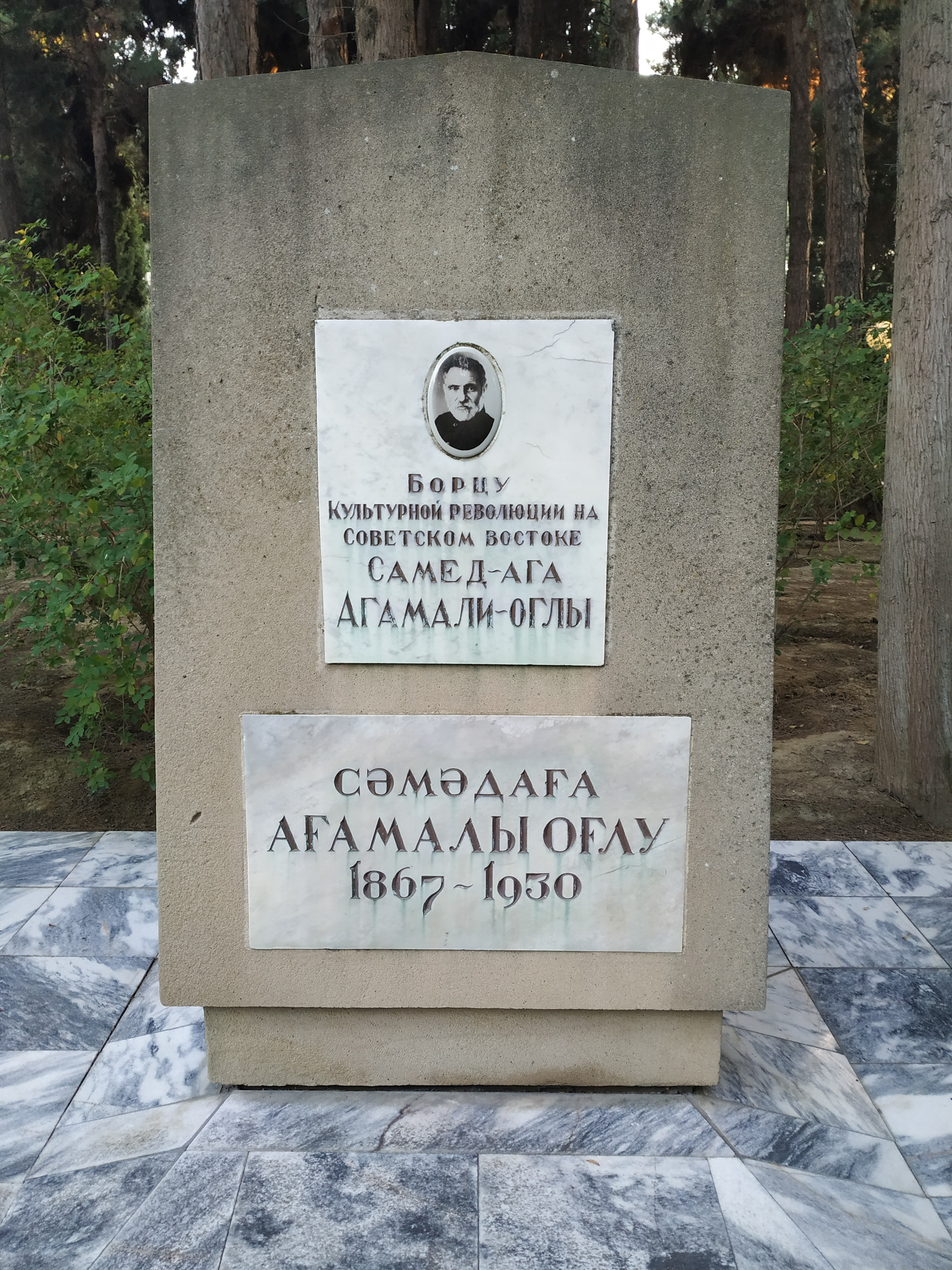 Səməd ağa Ağamalıoğlunun məzarı